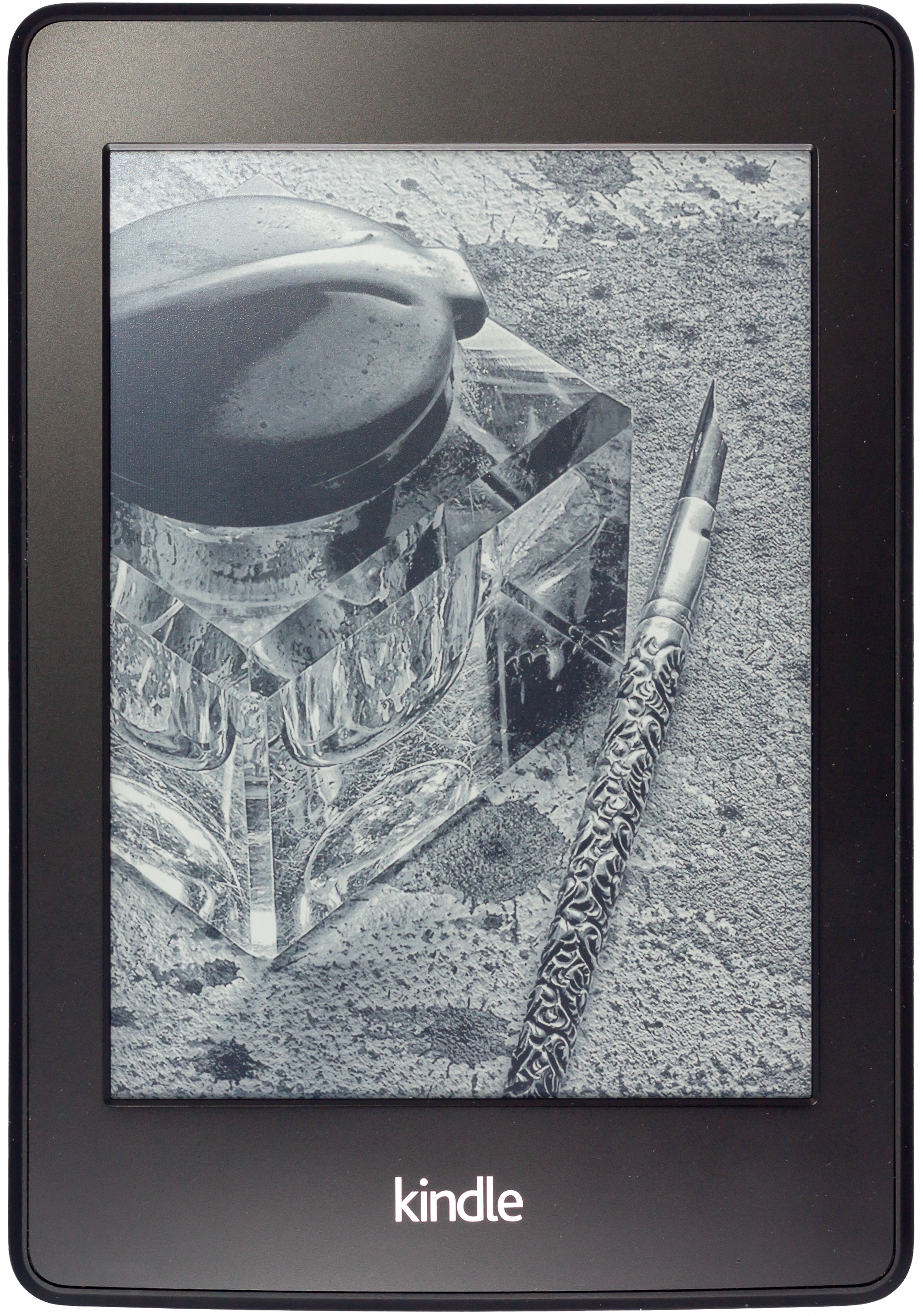 Kindle Paperwhite 2° geração com 4GB